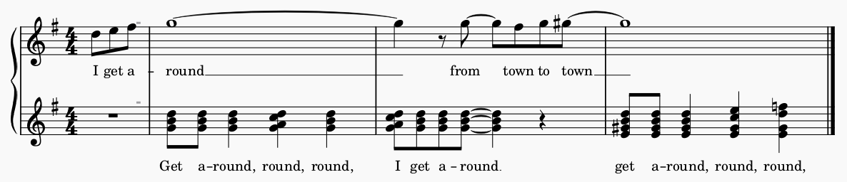 Part from the vocal construction in the Beach Boys song "I get Around"